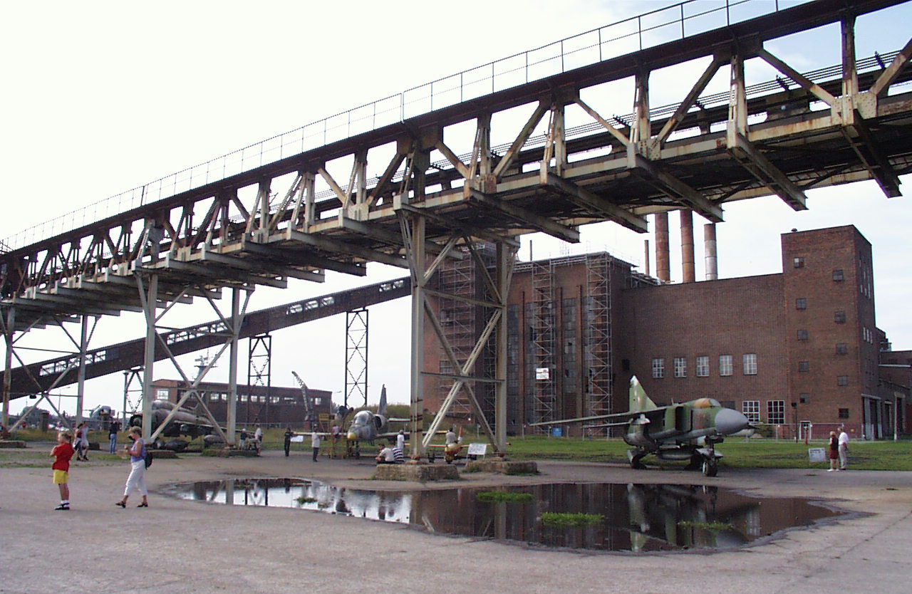 Das Kraftwerk, das Förderband